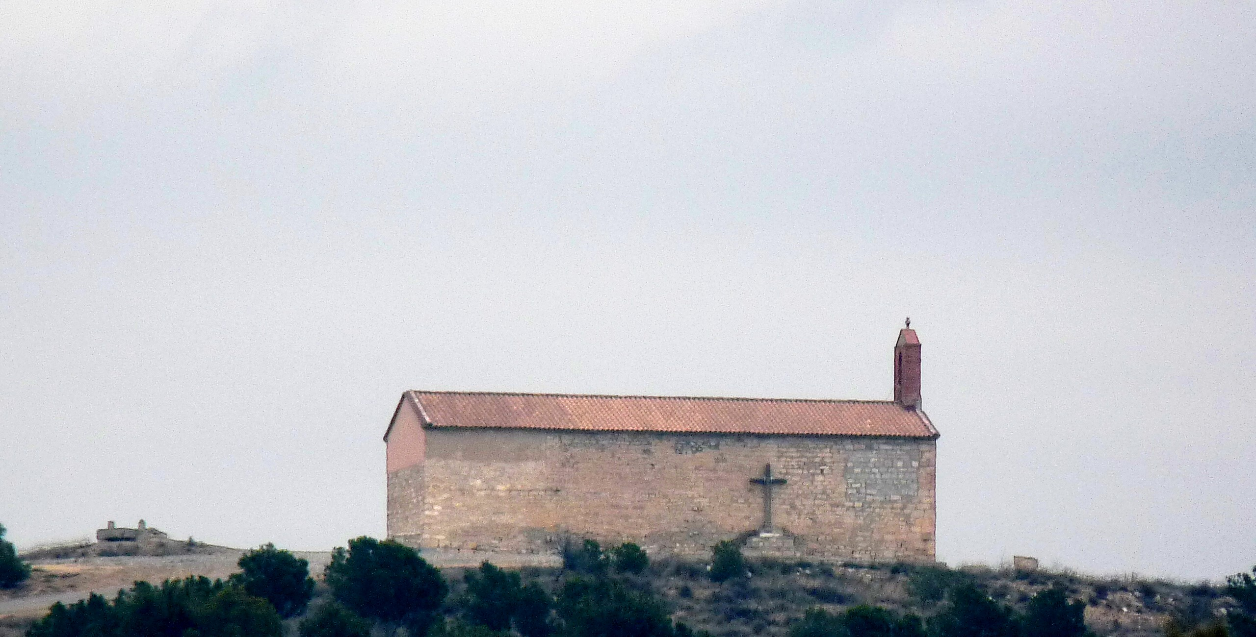 Zaidín - Ermita de San Antón